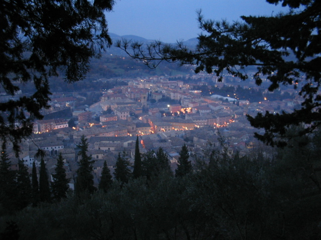 Città di San Severino Marche, la piazza